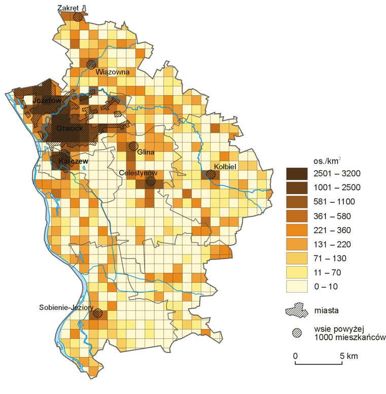 Przykład kartogramu skonstruowanego na podstawie pól geometrycznych – mapa gęstości zaludnienia powiatu otwockiego w 2011 roku